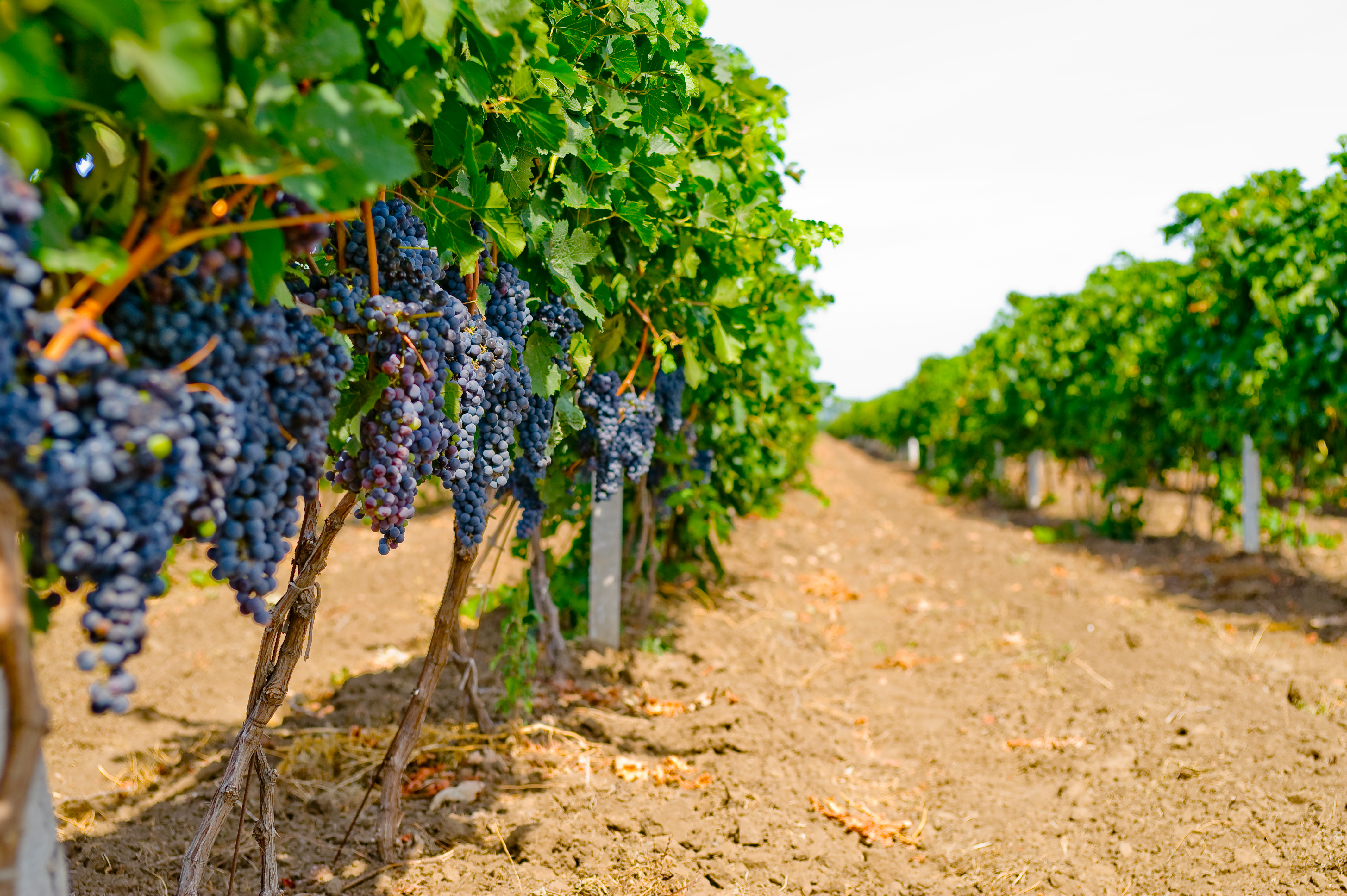 Виноградники Шабо. Мерло